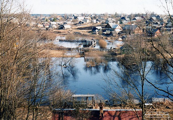 Vaade Osmino külale